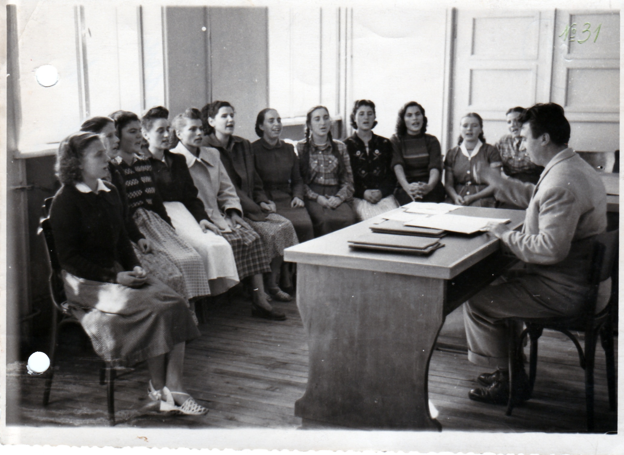 Златко Коцев - музикант, композитор, диригент, живял от 1921 г. до 1991 г. Създател и първи художествен ръководител на ансамбъл Пирин. Първите репетиции на ансамбъла са в гр. Петрич. На снимката - първите хористки на ансамбъла по време на репетиция, 1954 г.